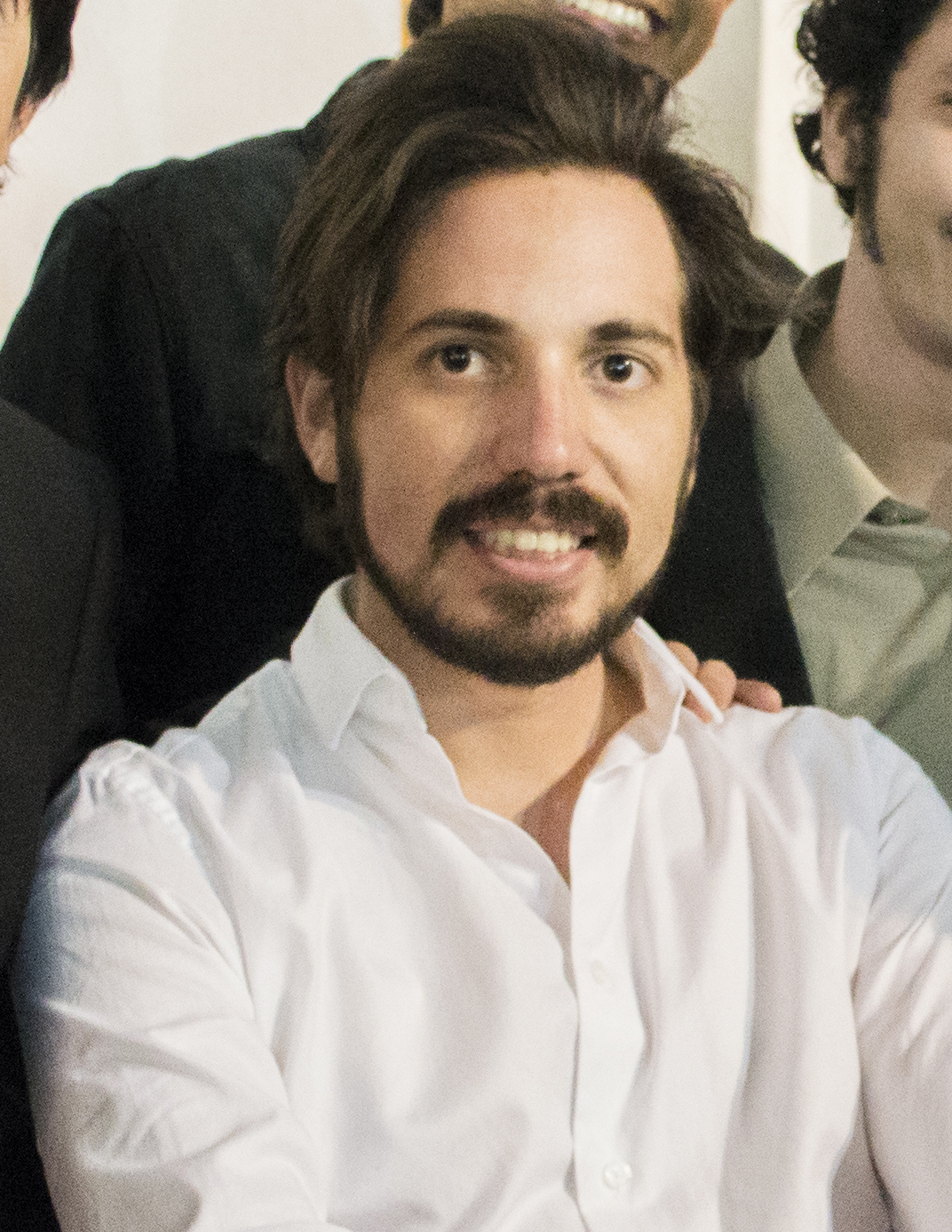 Extracto de fotografía junto a Enchufetv.